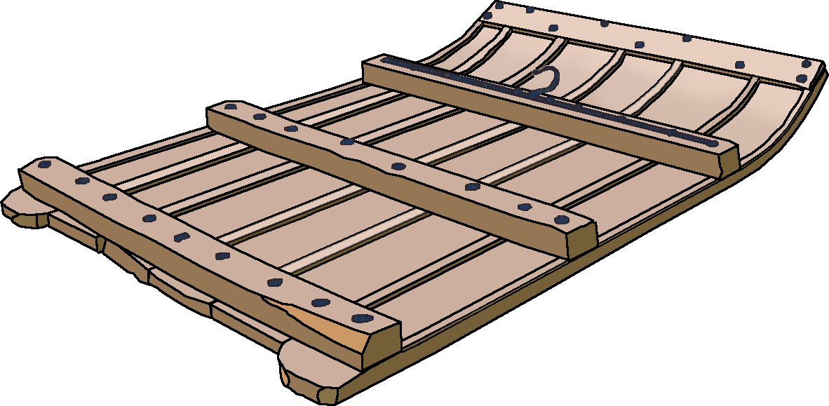 Trillo español, terminado